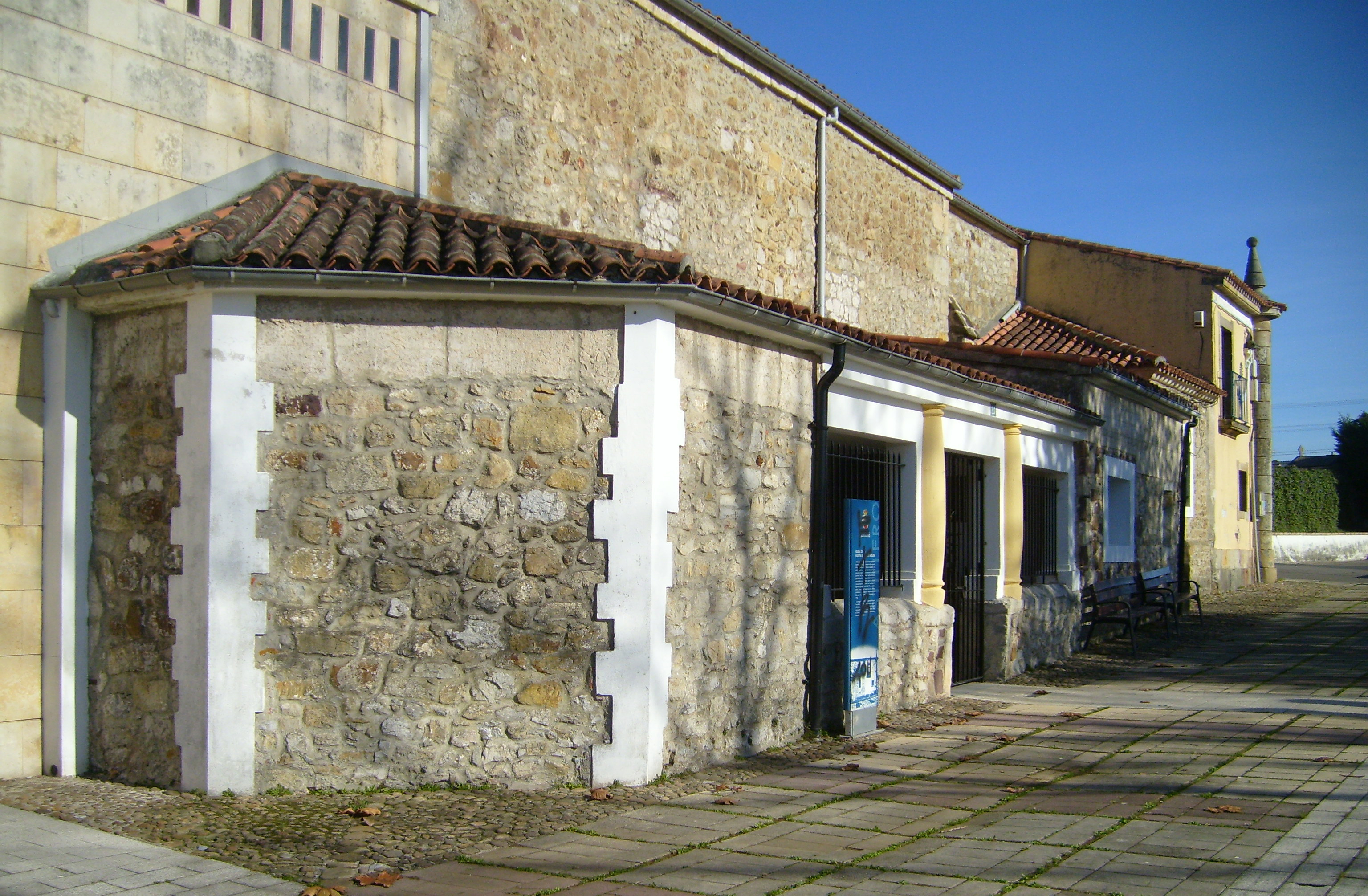 Vista lateral de la Iglesia de Nuestra Señora de Muslera situada en Guarnizo